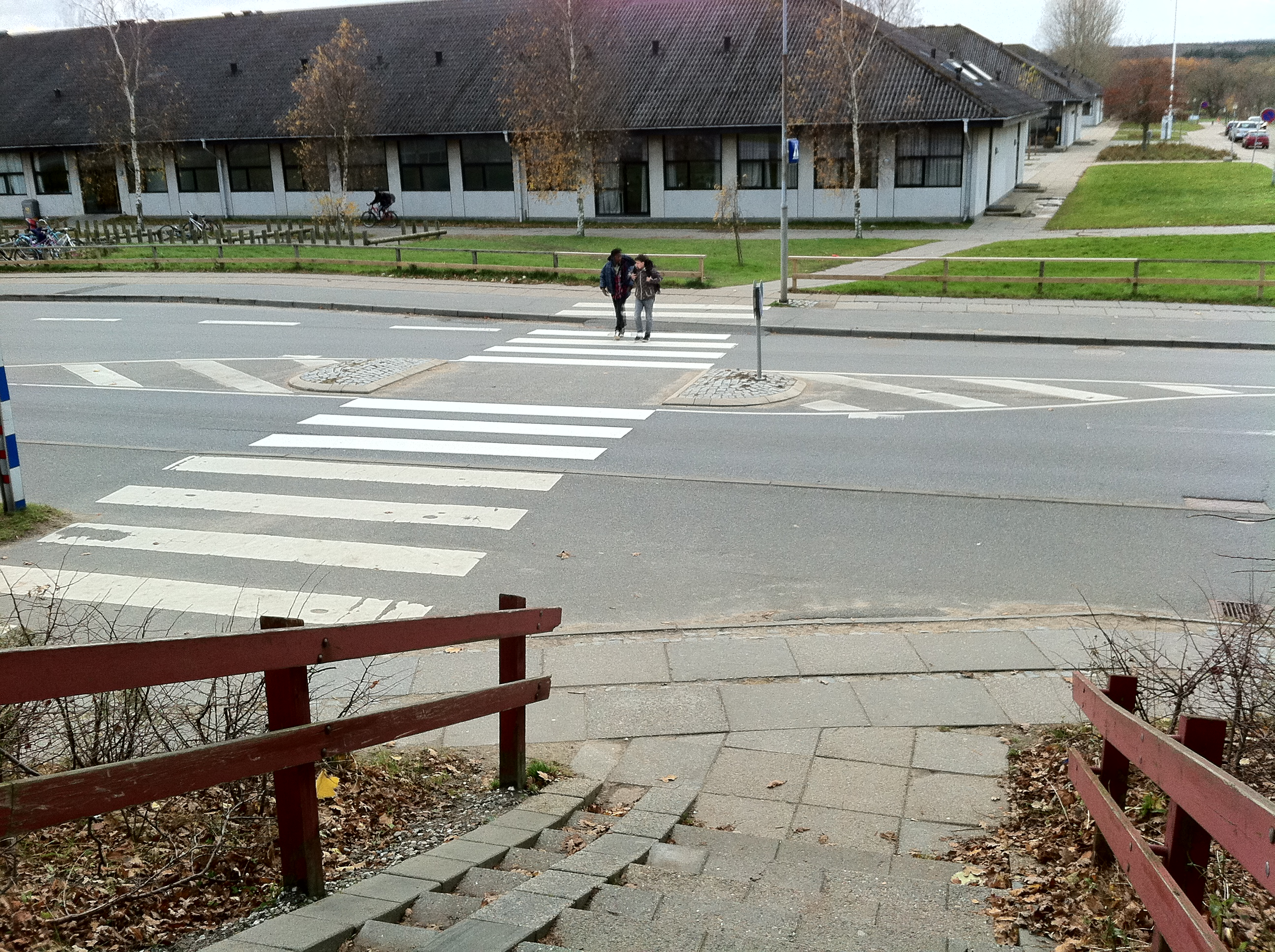 Rønbækskolen set fra trappen ved siden af.